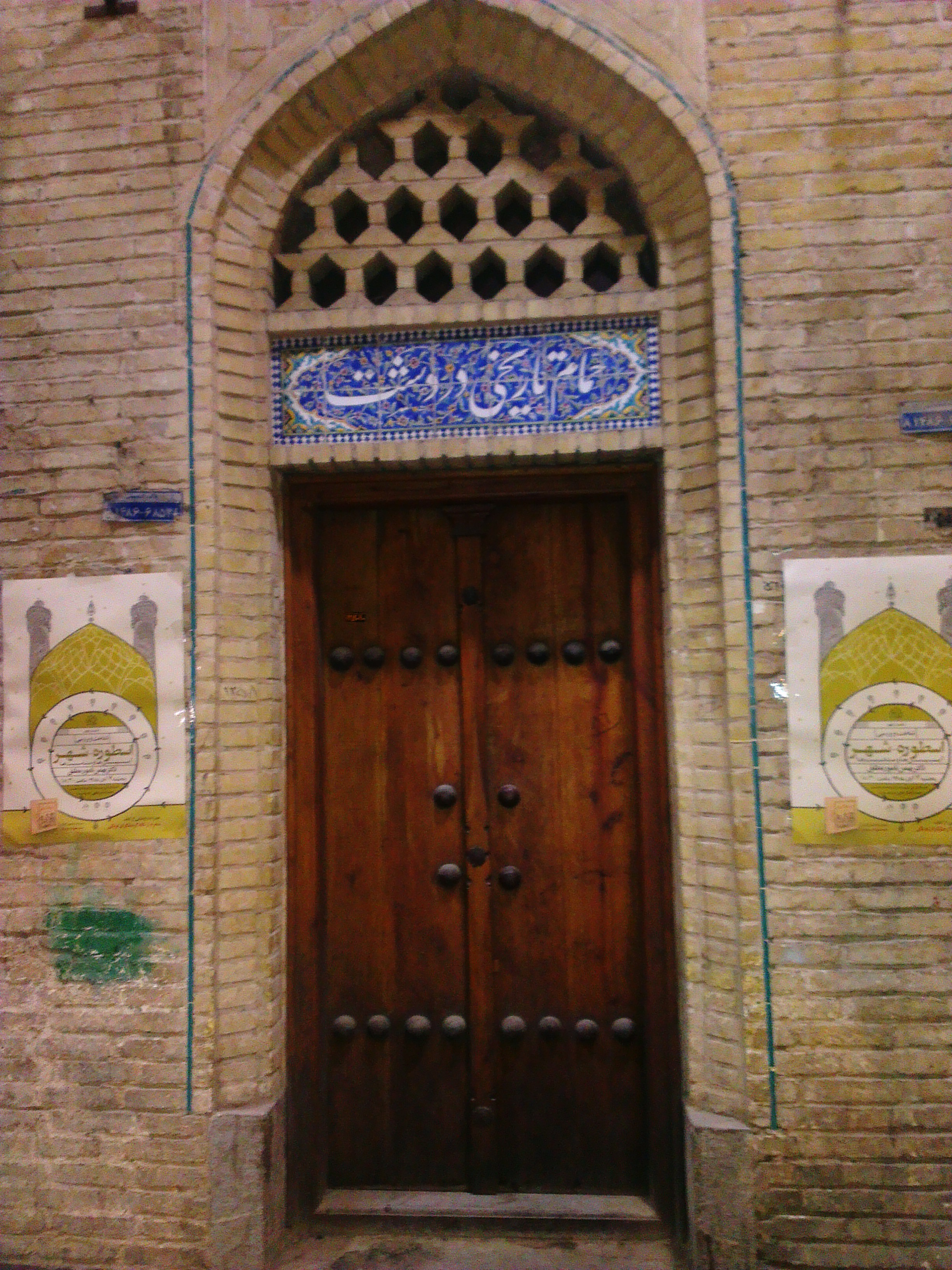 ورودی حمام دردشت